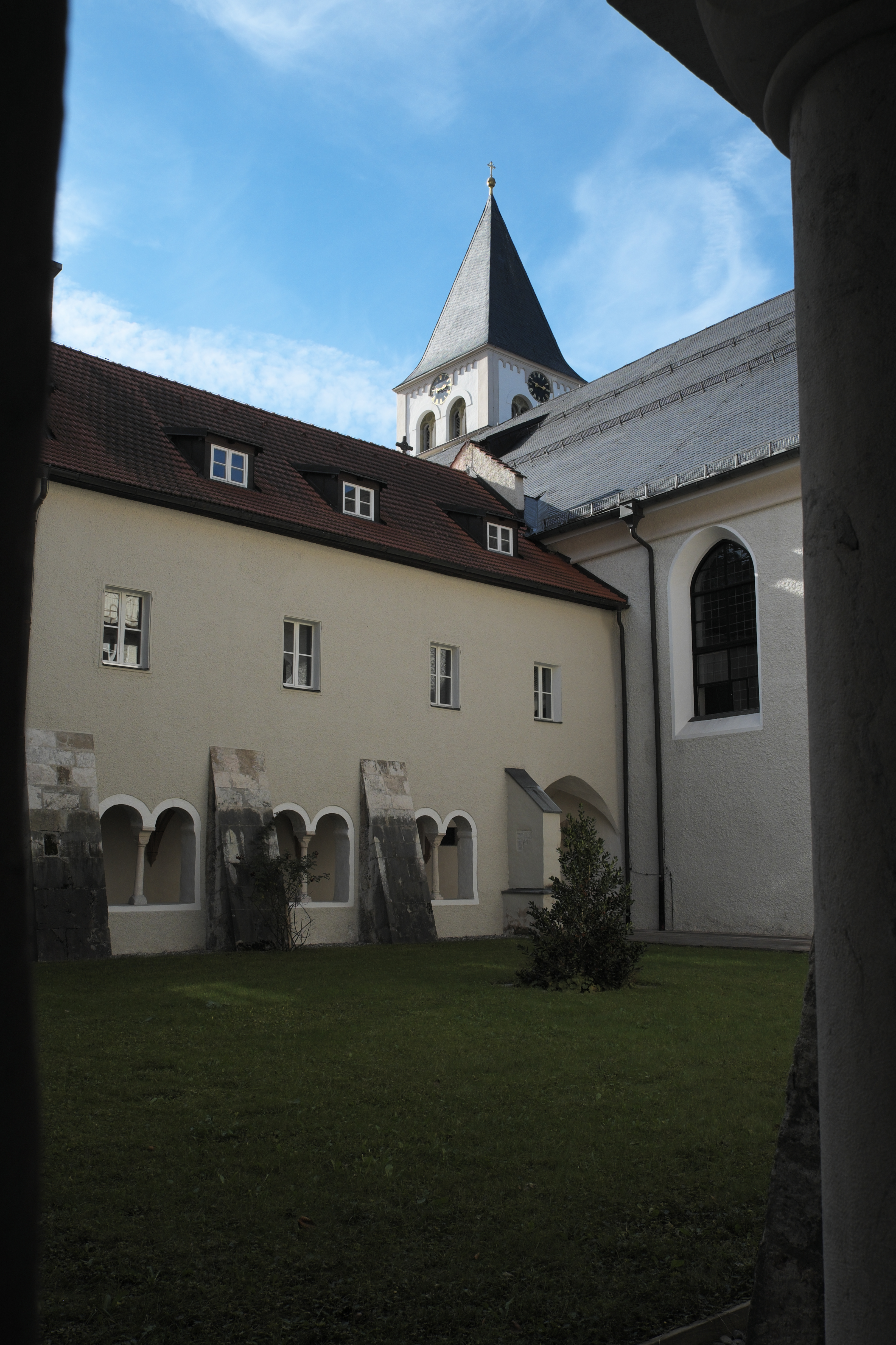 Kloster St. Zeno in Bad Reichenhall im Landkreis Berchtesgadener Land (Bayern/Deutschland), Kreuzgang